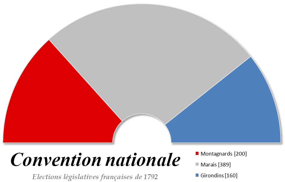 Composition de la Convention nationale française élue en septembre 1792